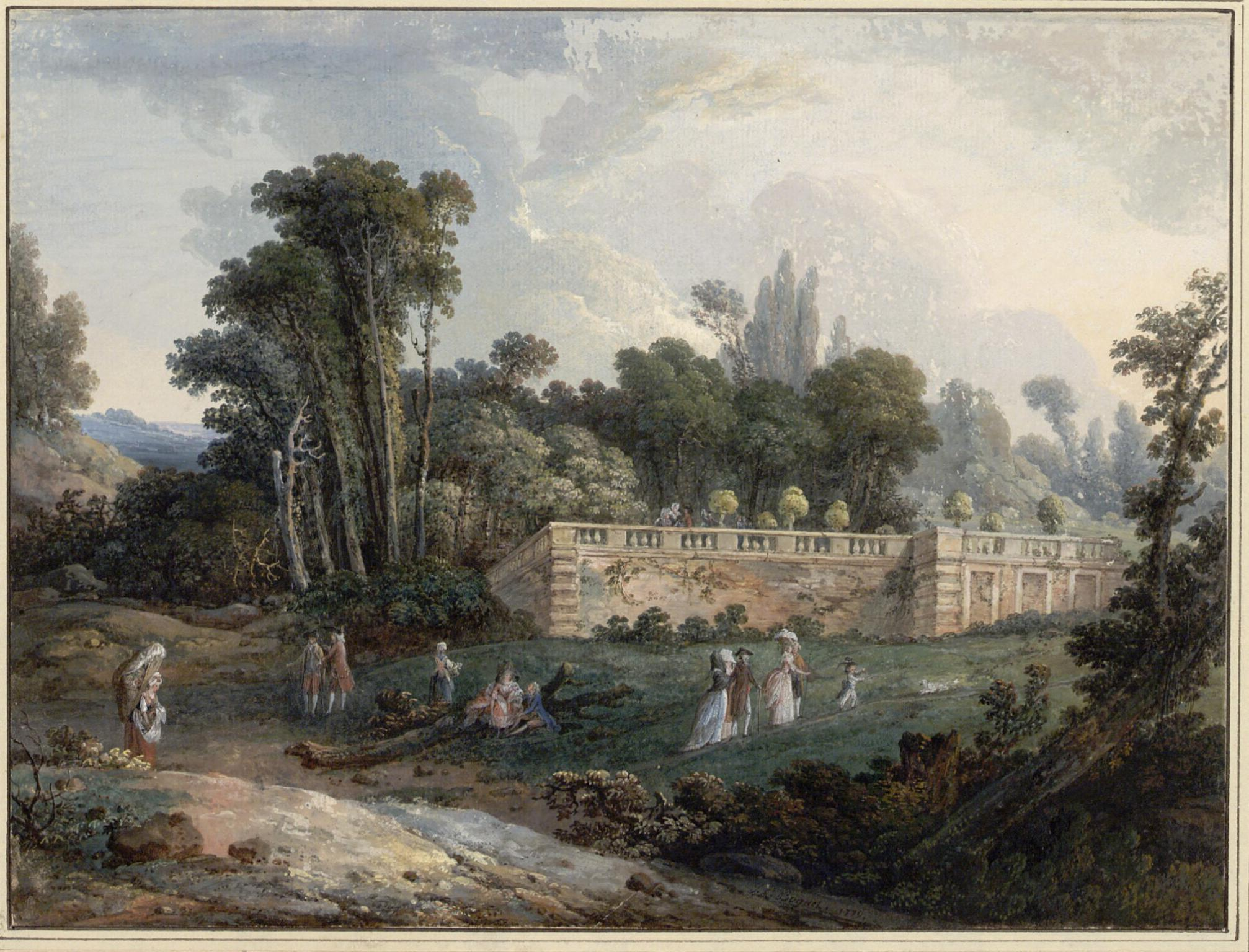 Vue du parterre du Globe au château de Meudon en 1779. Jean Pierre Bocquet (Paris 1751 - Paris 1817). Albertina museum, inv. 12591. Gouache, 22 x 29 cm.